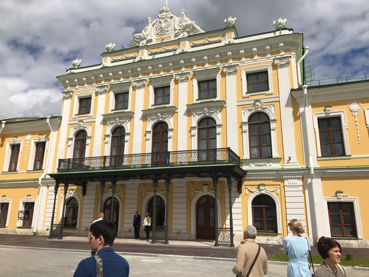 Twer in Russia